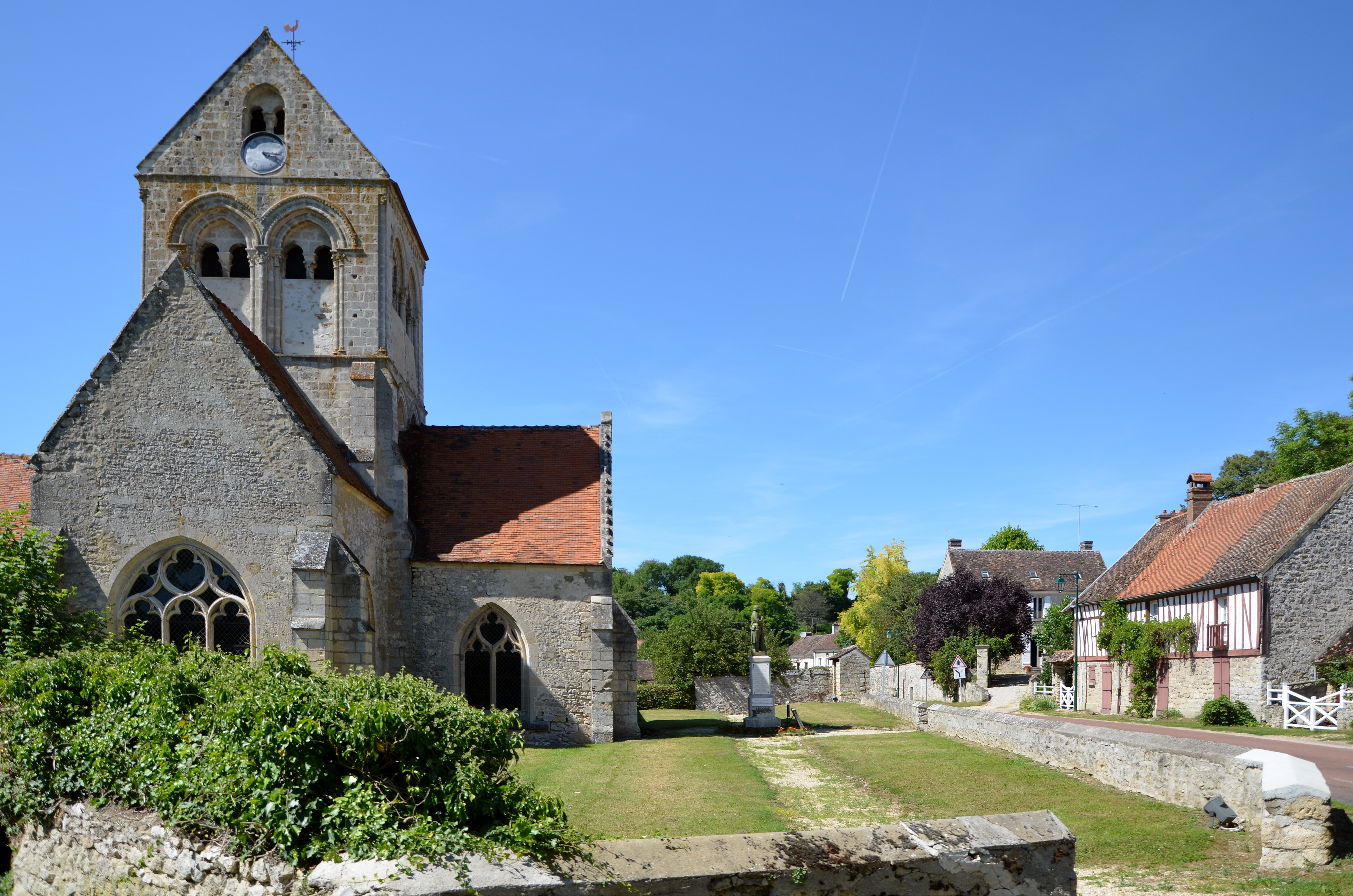 Église de Montigny-l'Allier , Aisne, Picardie, France